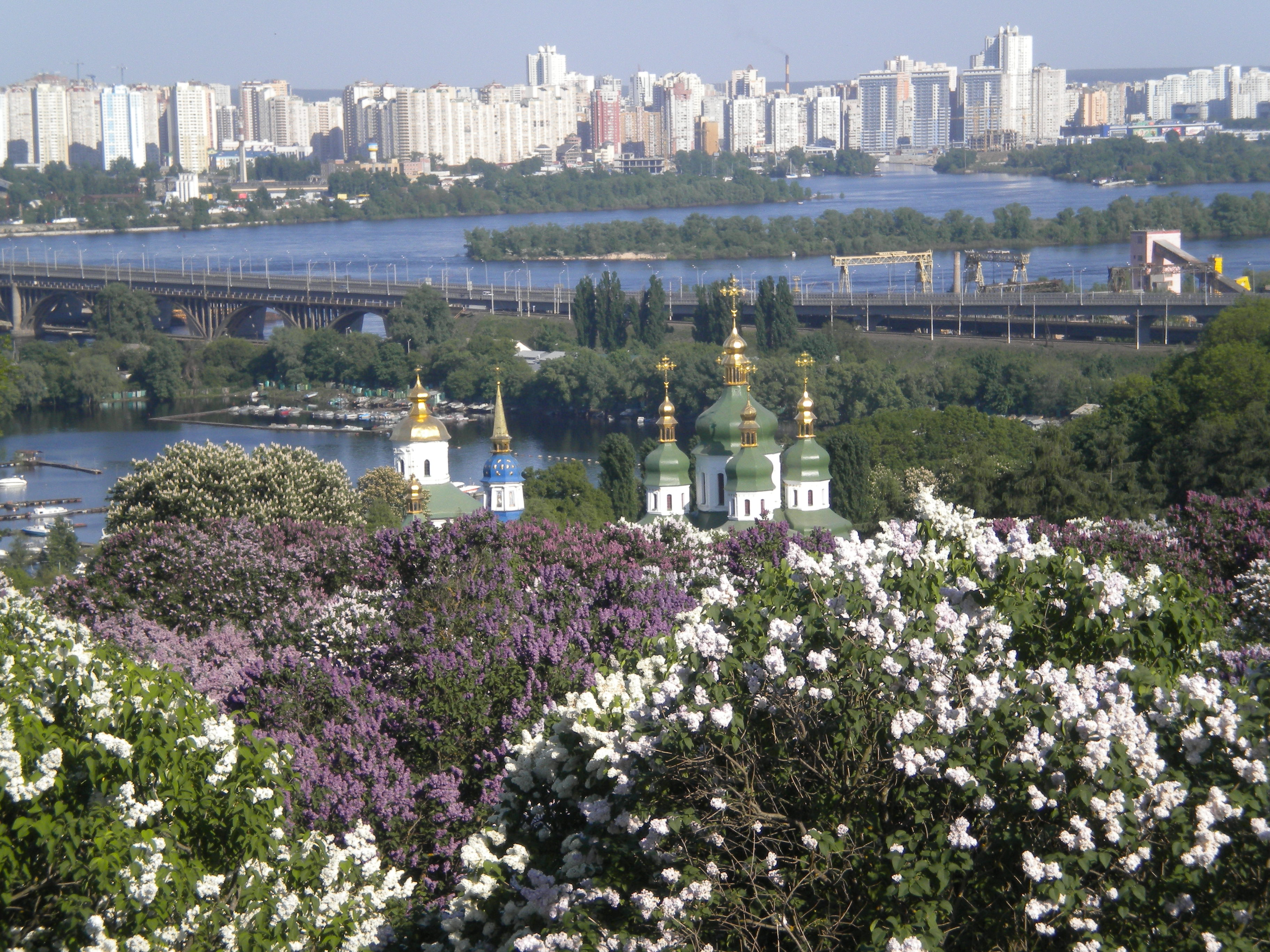 Центральний республіканський ботанічний сад АН УРСР (Національний ботанічний сад ім. М. Гришка НАН України), Київ, Тимірязєвська вул., 1